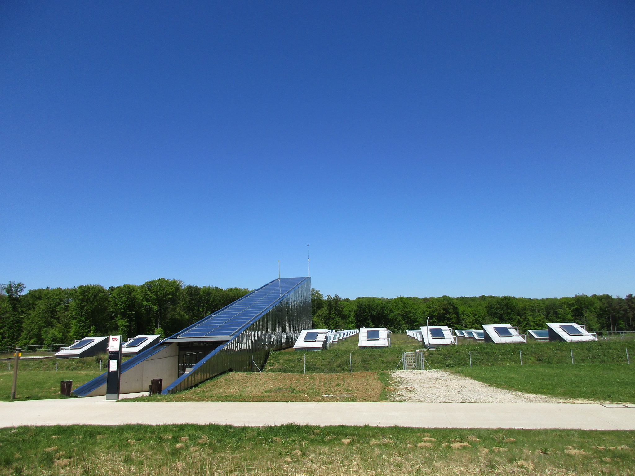 Panneaux solaire de la toiture de la gare TGV de Besançon